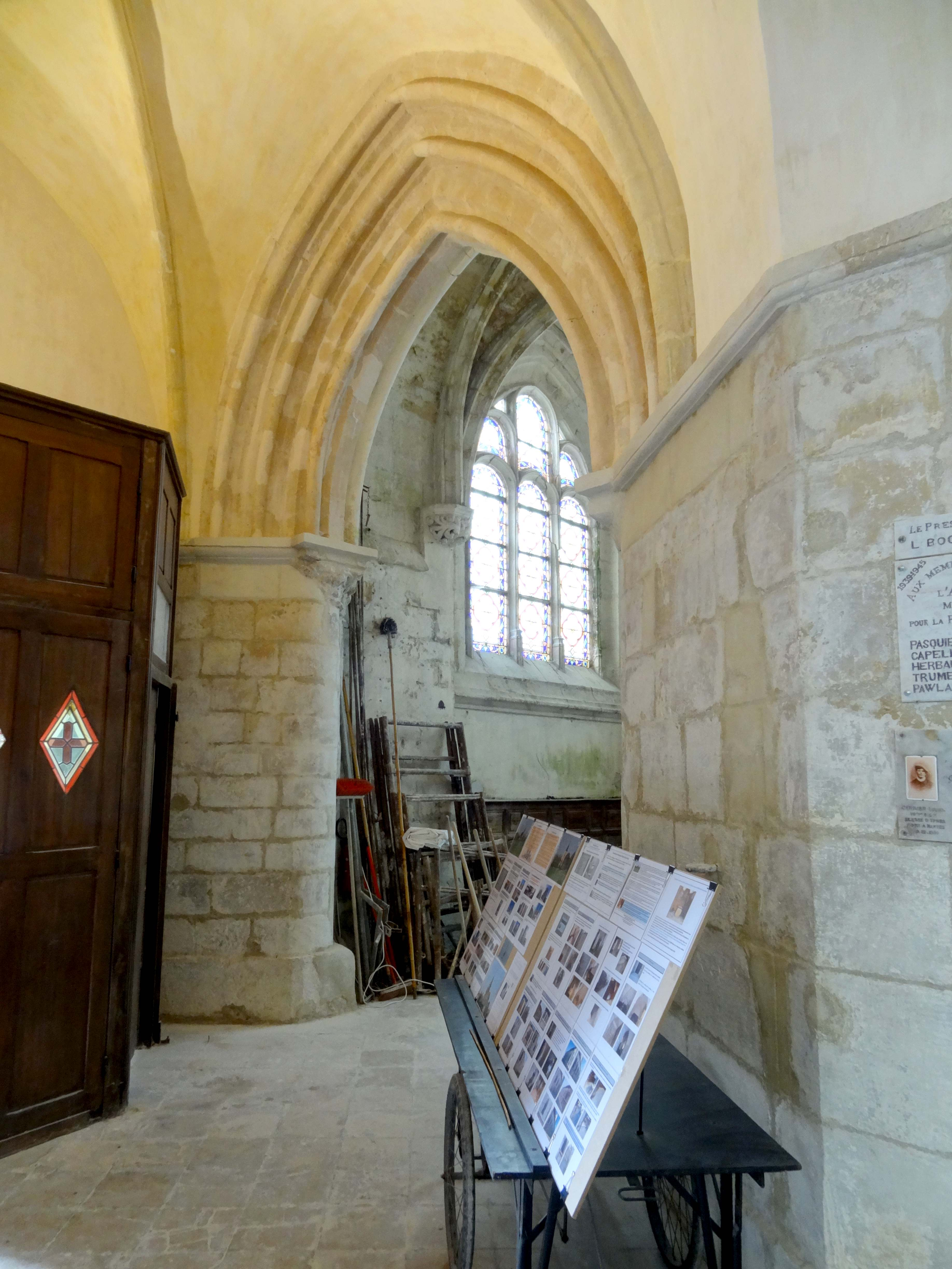 Intérieur de l'église - voir titre.